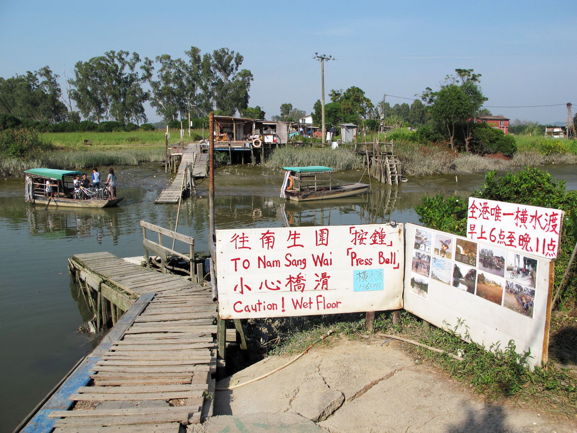 Kam Tin River Inter Islands